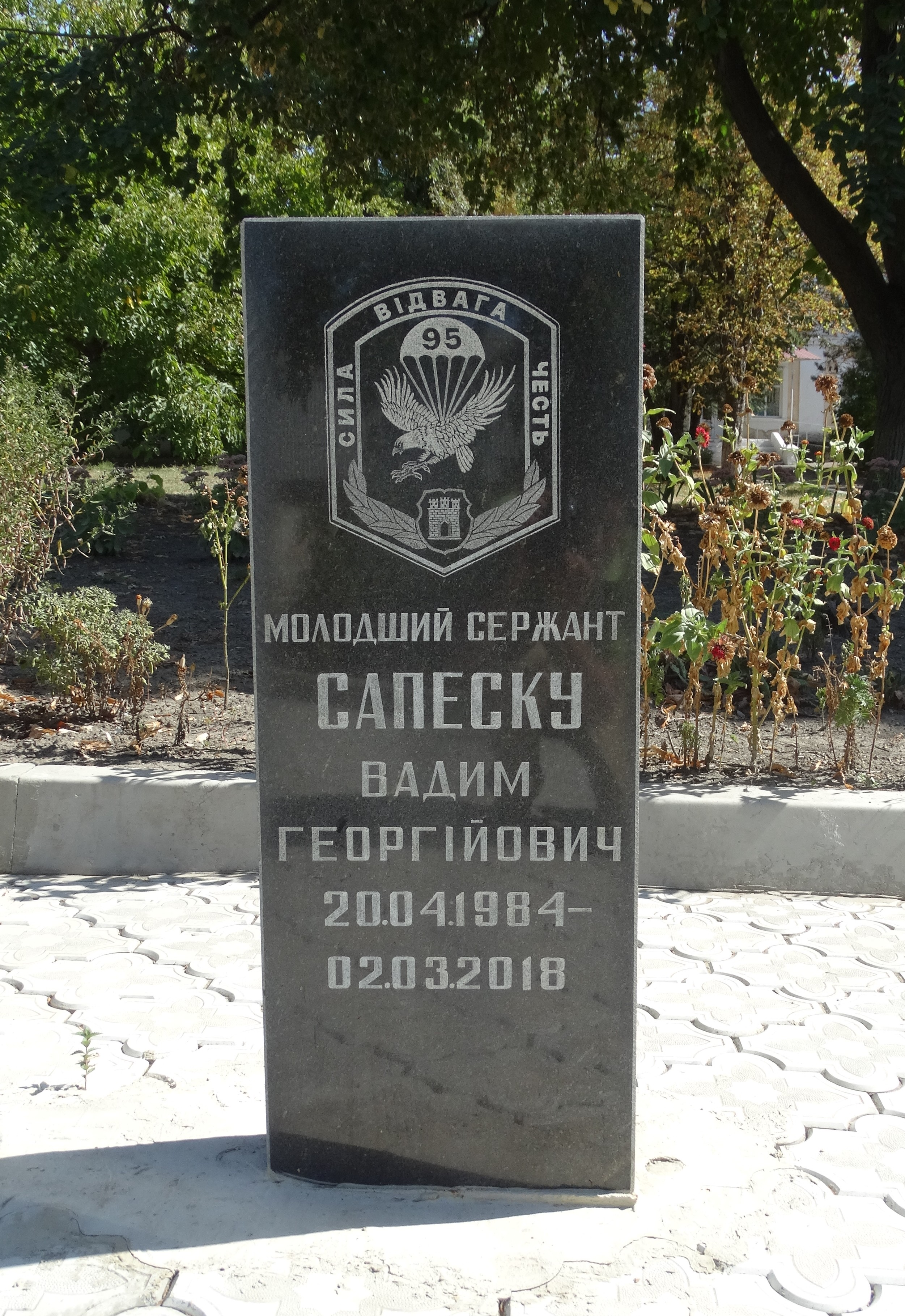 Вікіекспедиція на північ Одещини